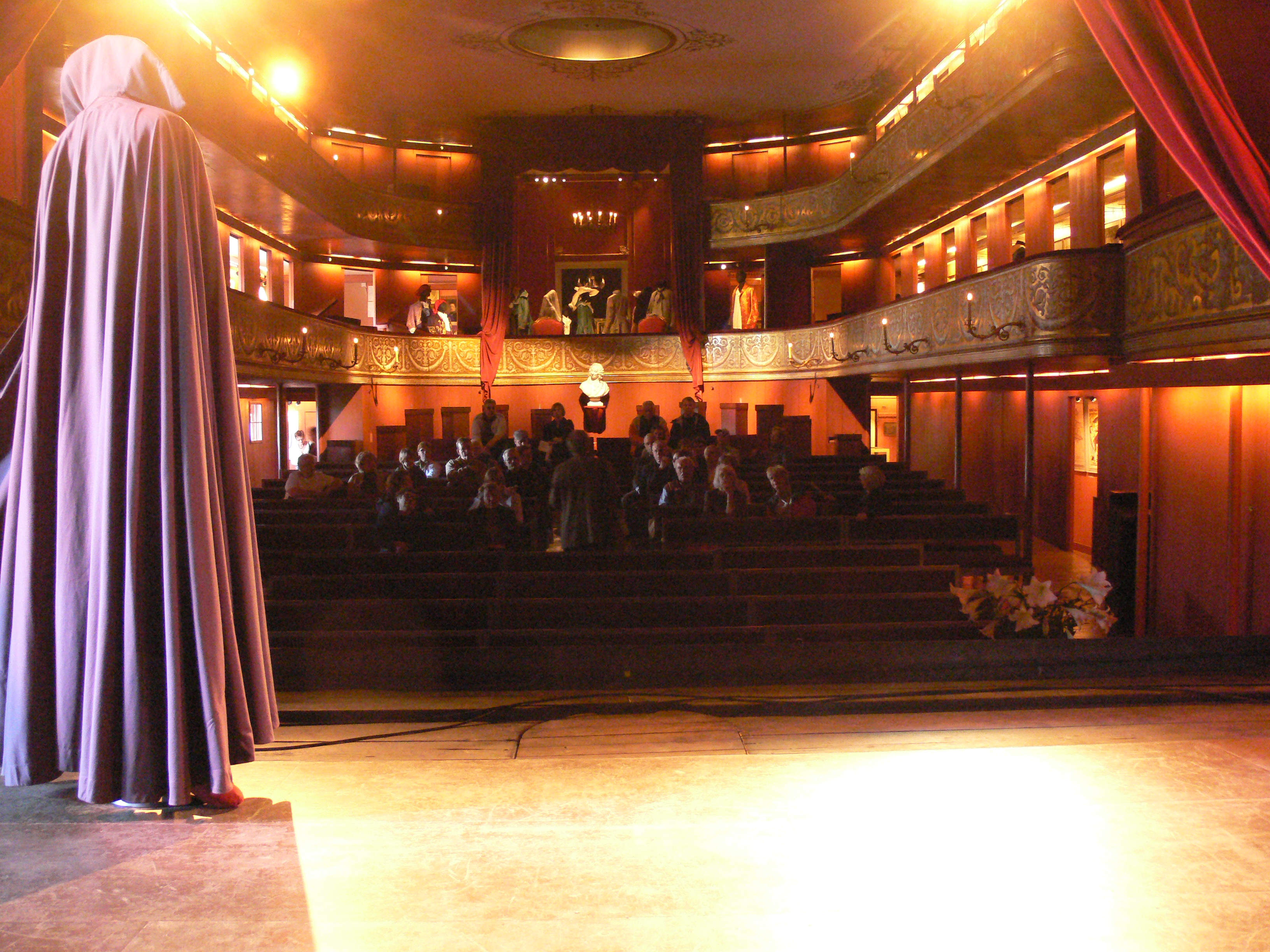 Königliches Hoftheater in Kopenhagen